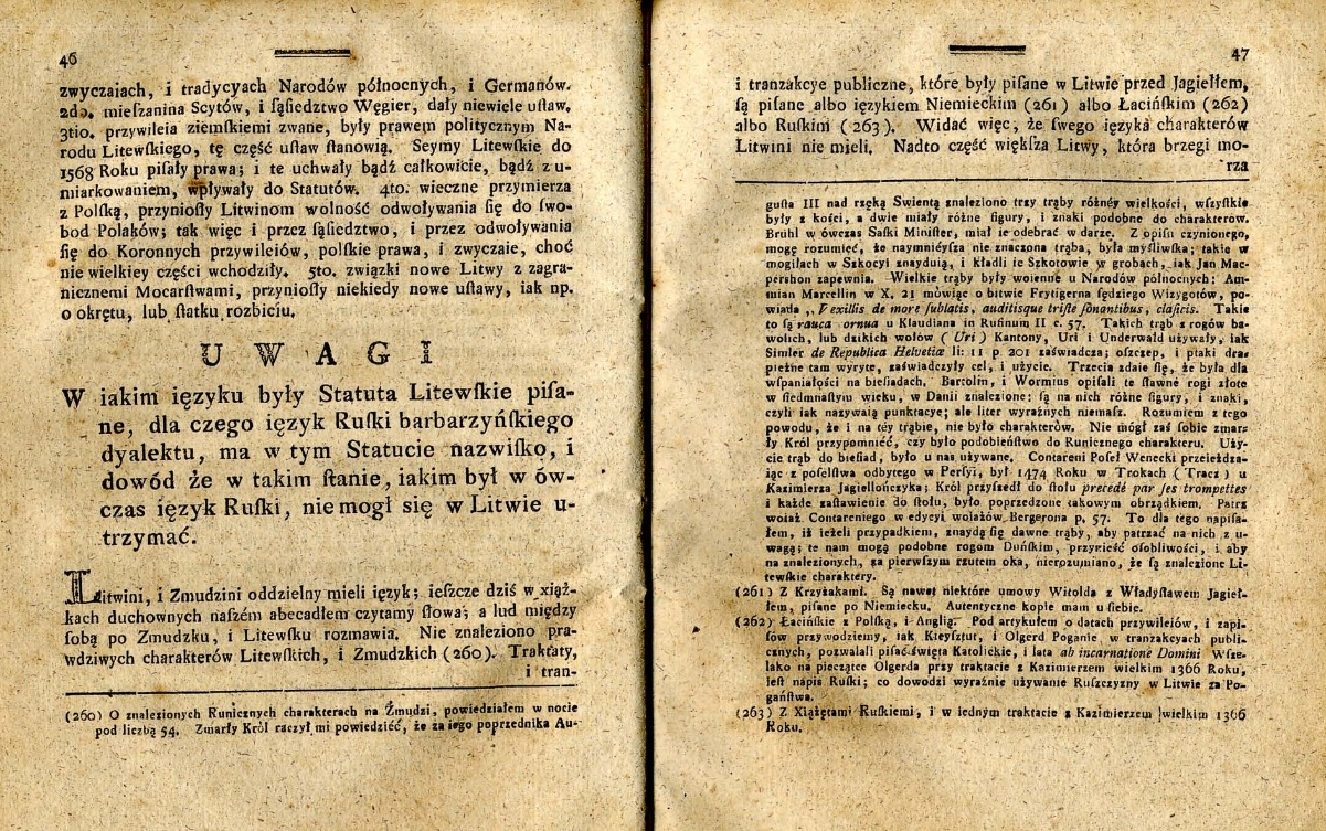 Различие между русским и литвинским языками